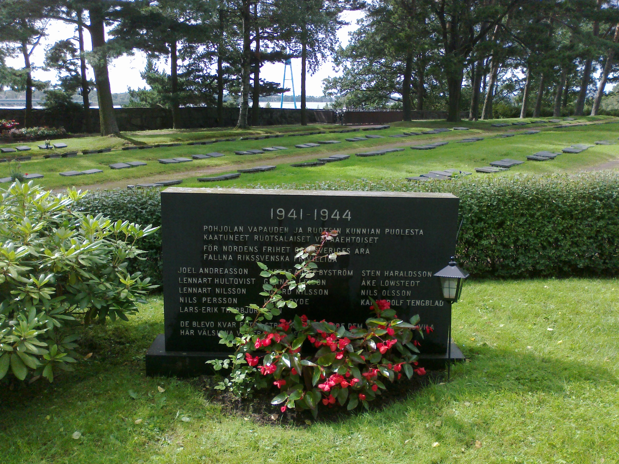 Ett minnesmärke över de svenska frivilliga som deltog i fortsättningskriget i Finland 1941-1944. Sandudds begravningsplats i Helsingfors. (fi: Hietaniemen hautausmaa, Helsinki)